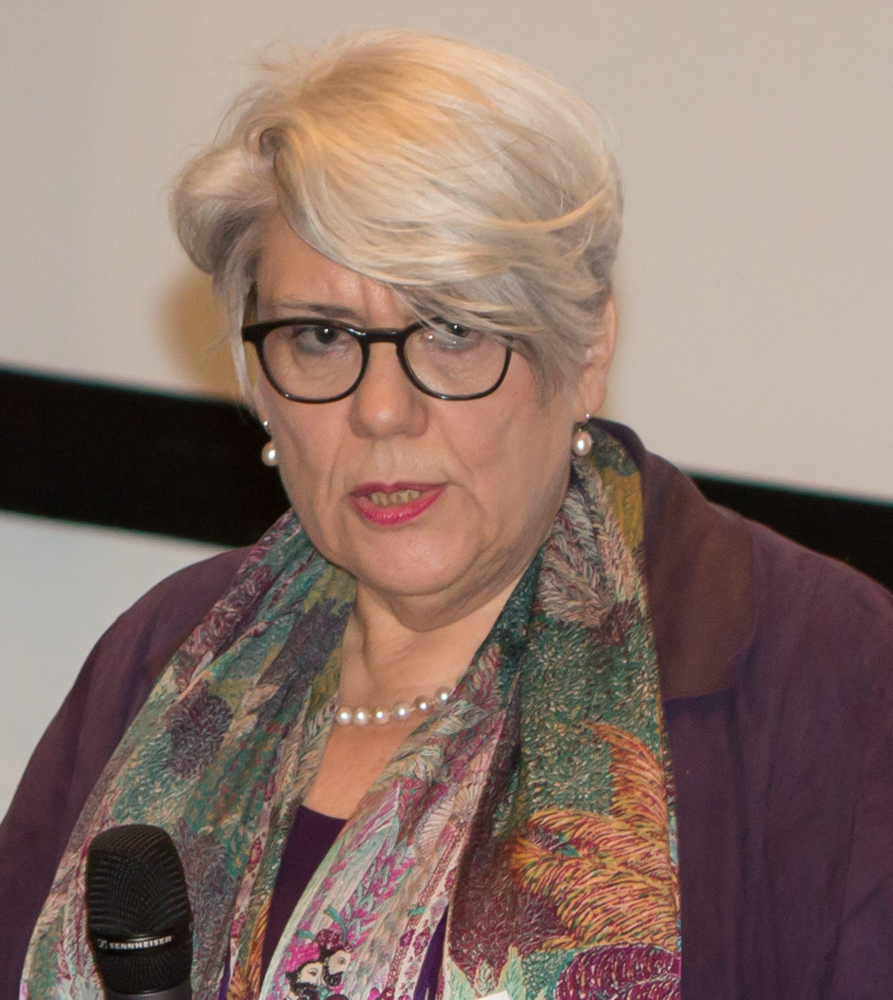 Gabriele C. Klug, Wahlleiterin bei der Wahl zum Oberbürgermeister der Stadt Köln 2015